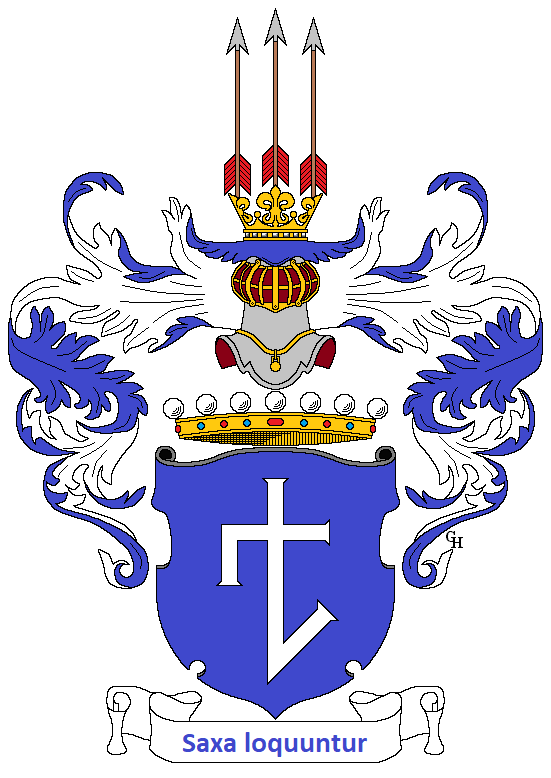 Wappen des deutsch-österreichischen Architekten Friedrich Schmidt (1825–1891), verliehen anlässlich seiner Erhebung in den österreichischen Freiherrenstand 1886. Zeichnung von Gerd Hruška ( Für weitere Informationen zu dieser Standeserhebung siehe (